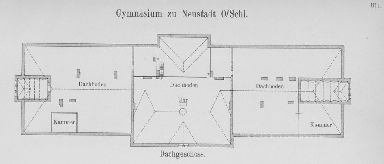 Rzut poddasza